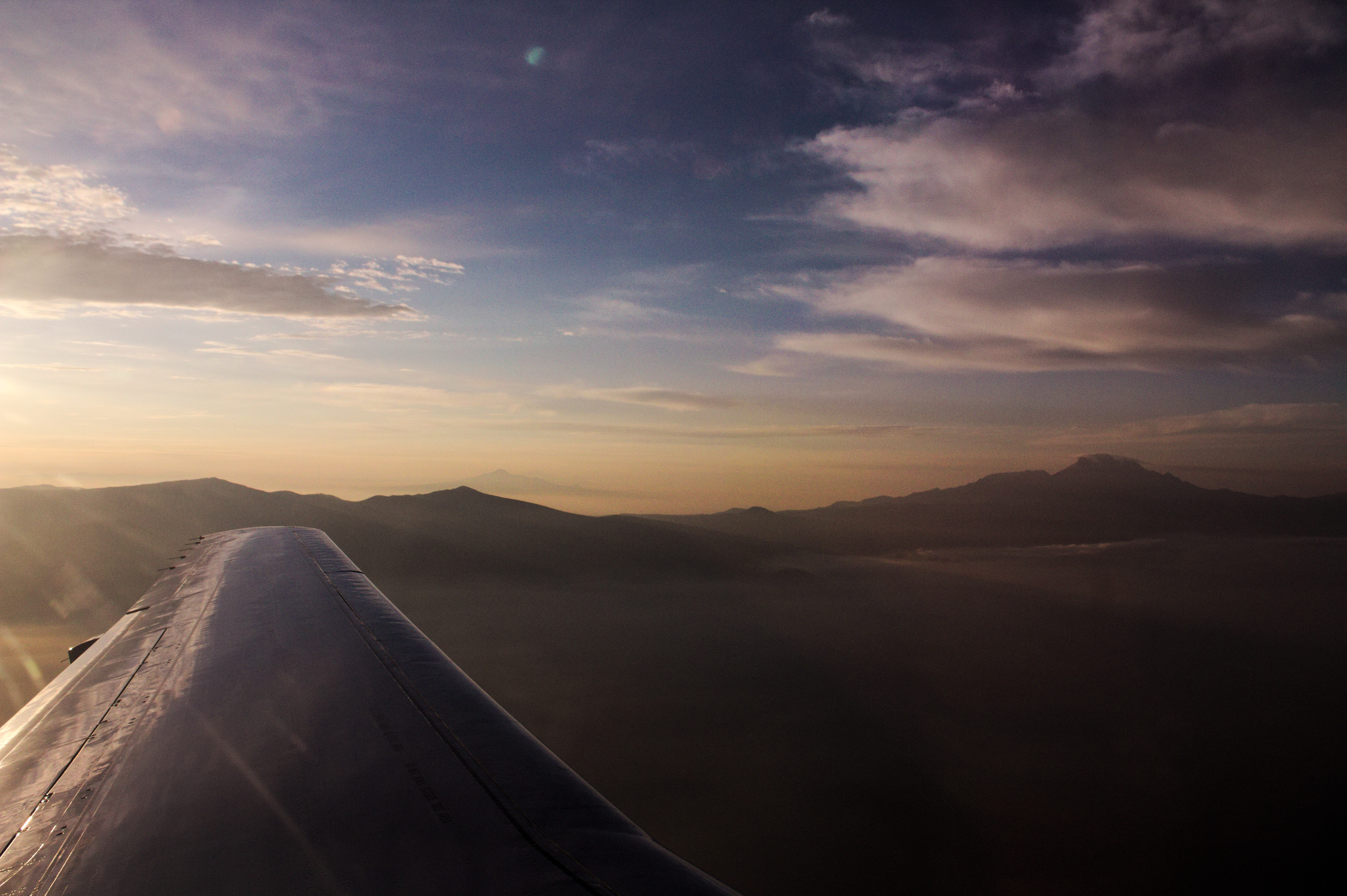 Serie de fotografías (Avión volando).